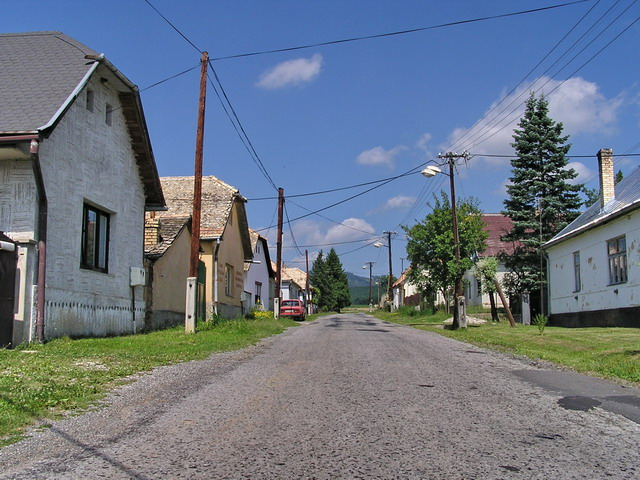 Obec Mládzovo